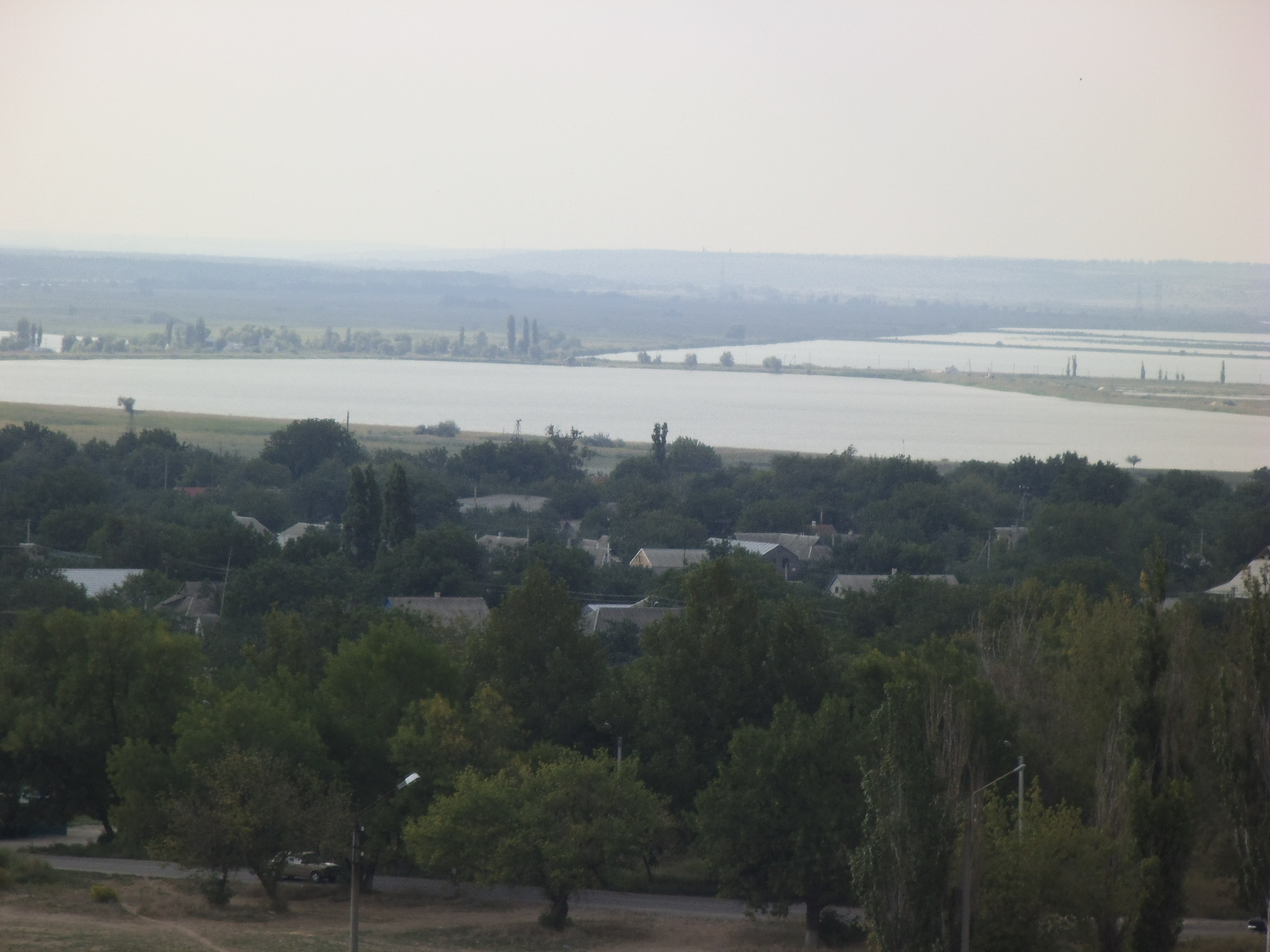 Місто Нова Одеса Миколаївської області. Вигляд на місто